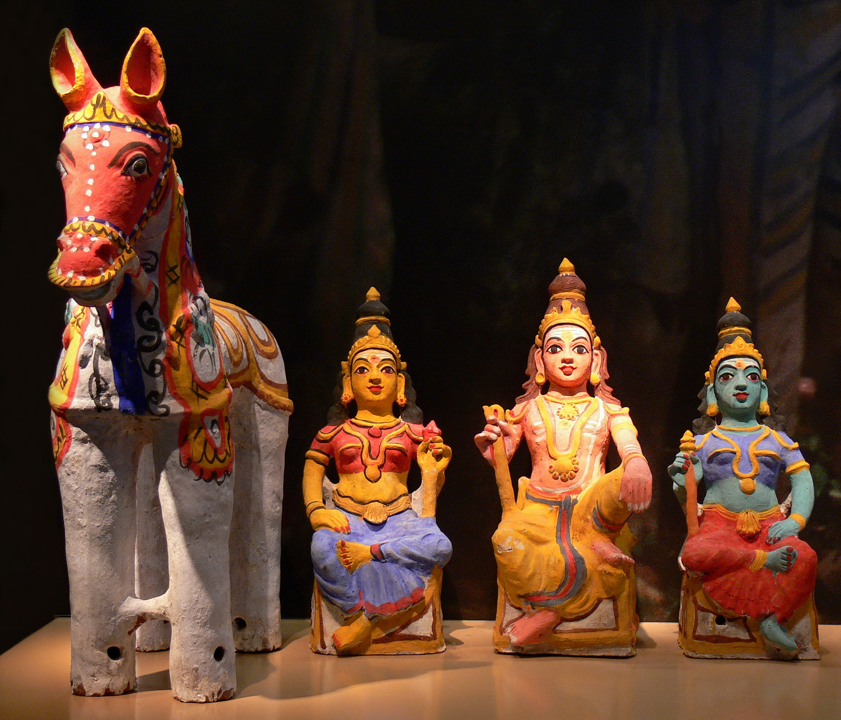 Aiyanar-Paarden (R-504) Tropenmuseum - Aiyanar-paard